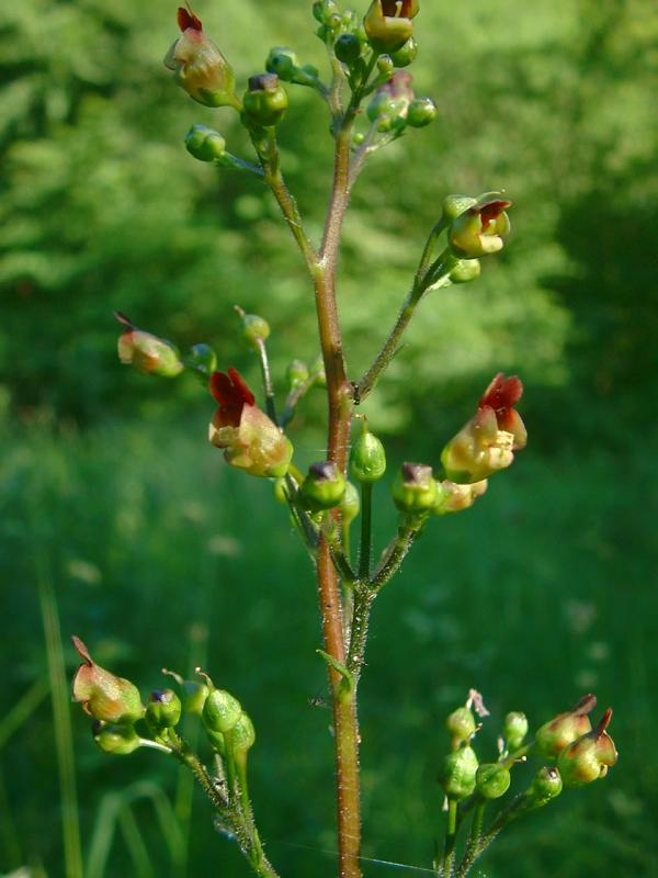 Scrophulaire noueuse , photo J.F. Gaffard, Bucey_lès-Gy, juin 2004